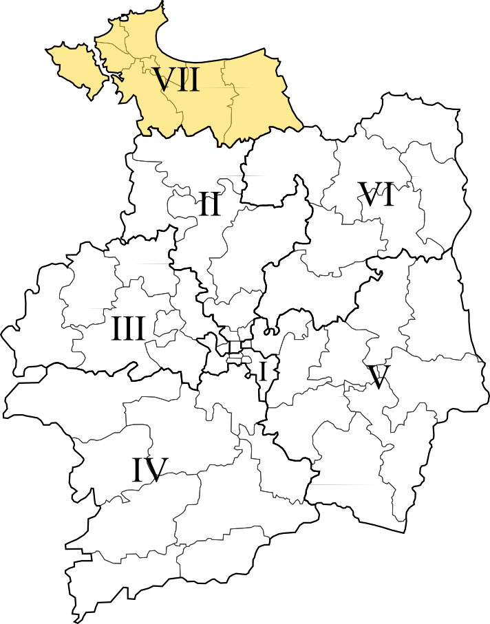 Carte de la septième circonscription d'Ille-et-Vilaine